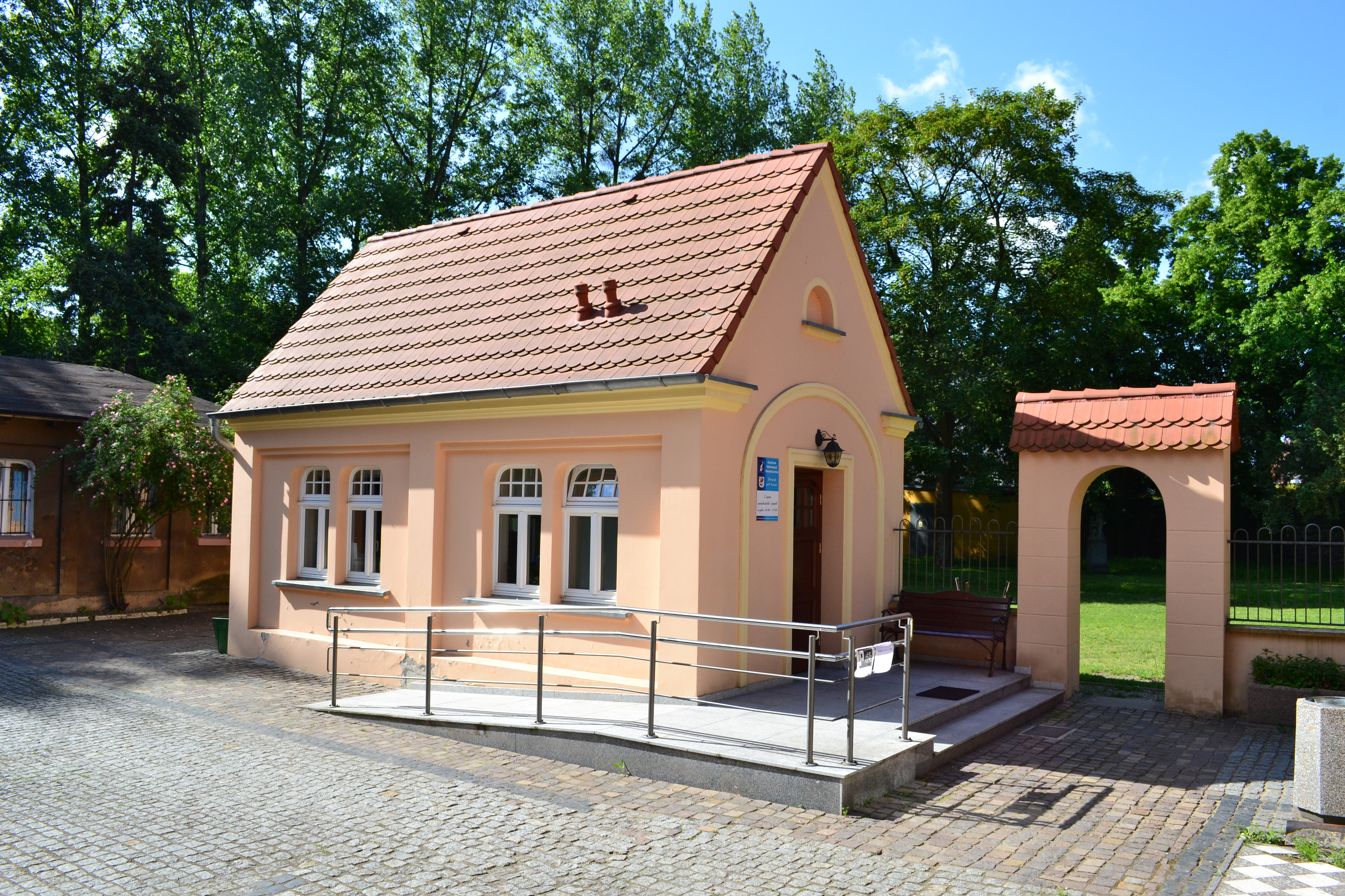 Pałacyk pod Lwami; Gryfino ul. Bolesława Chrobrego 48